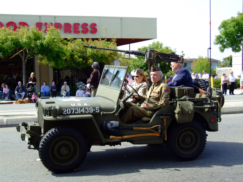 Parade, Castro Valley